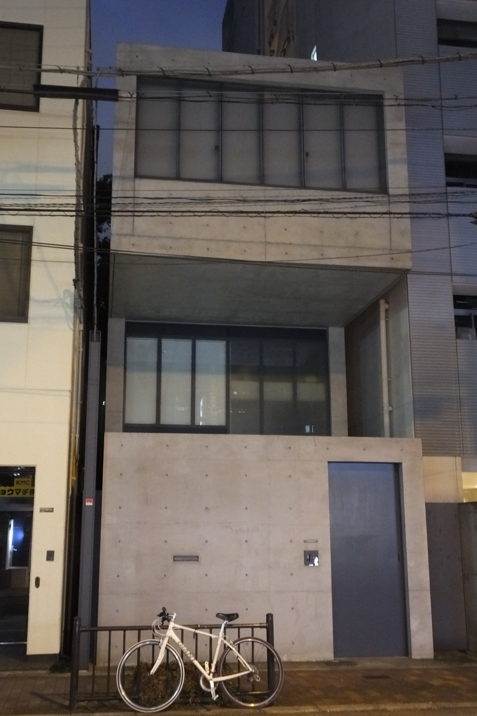 2019-08-06 Utsubo-koen-no-jutaku,Tadao Ando (靱公園の住宅,安藤忠雄)